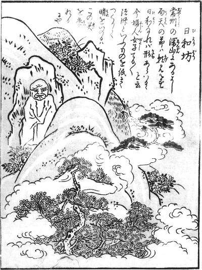 Hiyoribō (日和坊) from the Konjaku Gazu Zoku Hyakki (今昔画図続百鬼)